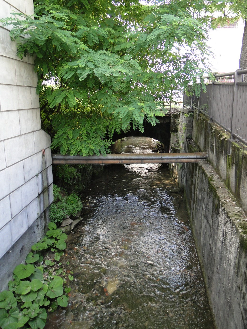 La roggia Colleonesca presso Bergamo (via Moroni), Italia